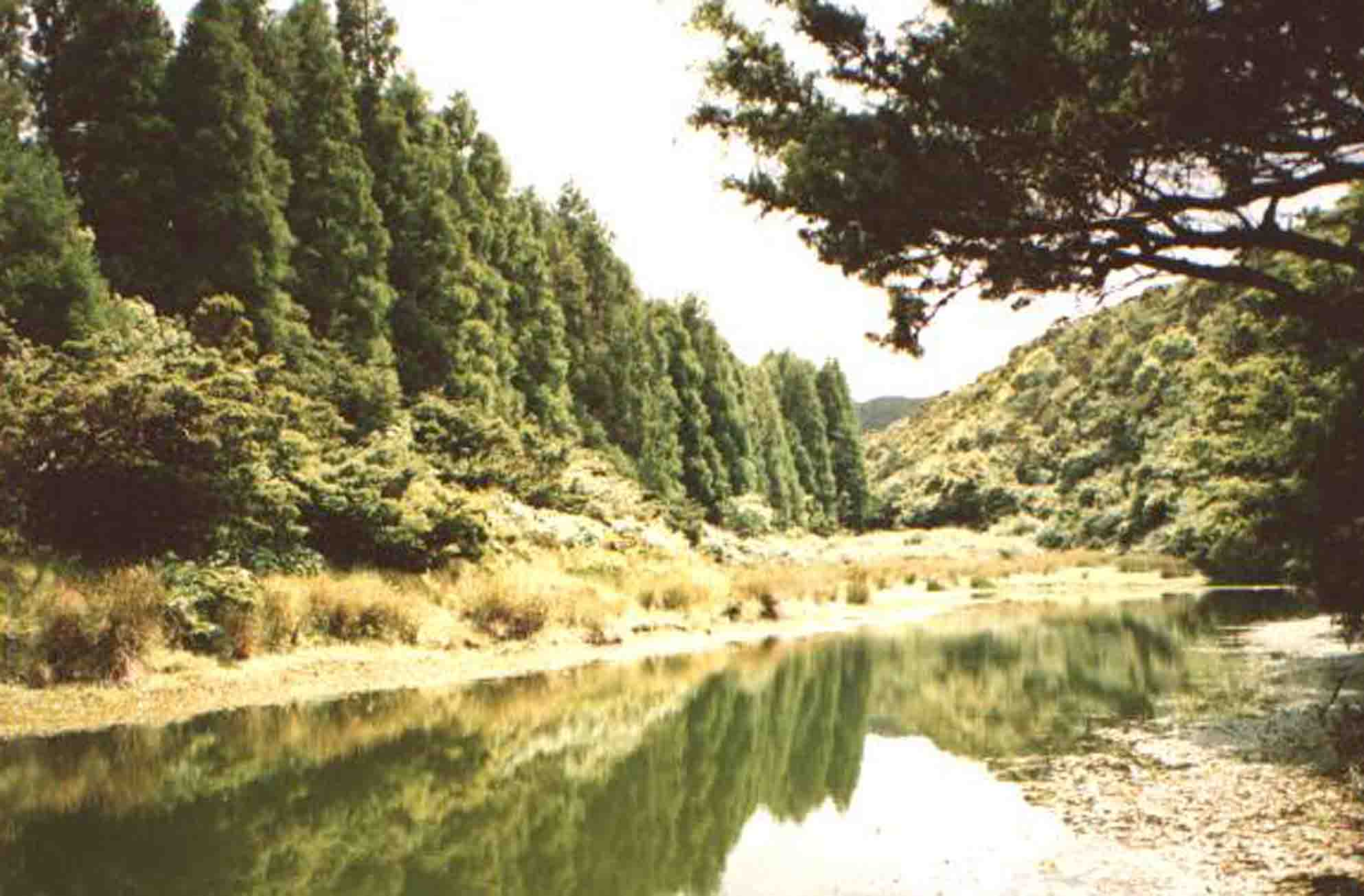 Chã das Lagoinhas, Lagoa Grande, Angra do Heroísmo, ilha Terceira, Açores, Portugal.